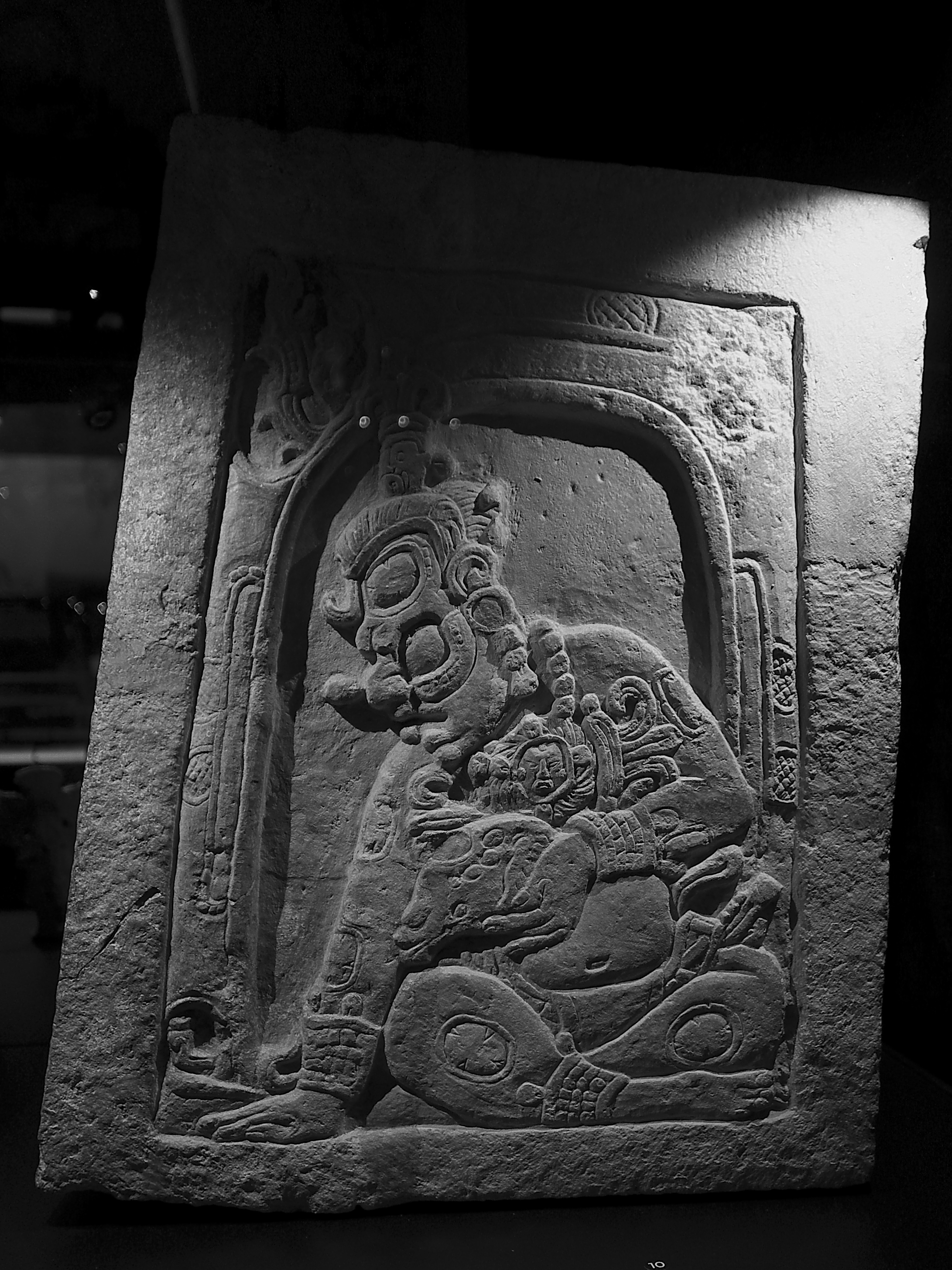 Mayas. El enigma de las ciudades perdidas (Museo Arqueológico de Alicante). Respaldo de trono, Dos Pilas. Periodo Clásico Tardío (750). El dios K'inich Ajaw con el glifo, K'in.